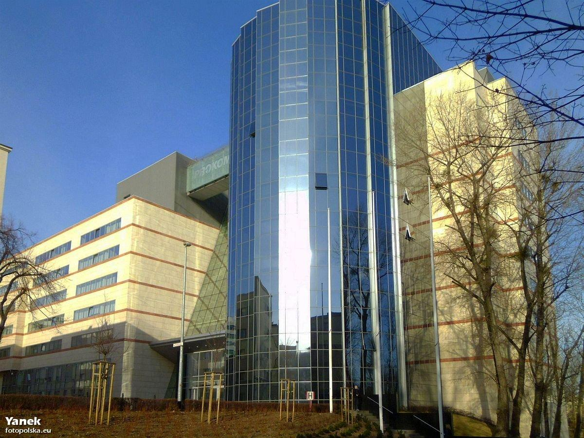 Biurowiec Prokomu w Gdyni.